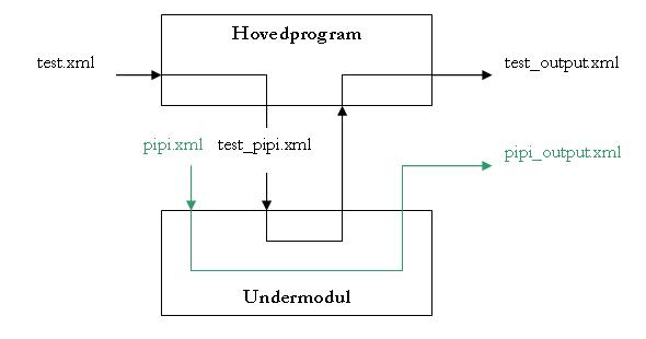 Et eksempel på hvordan en pipi-fil opstår.